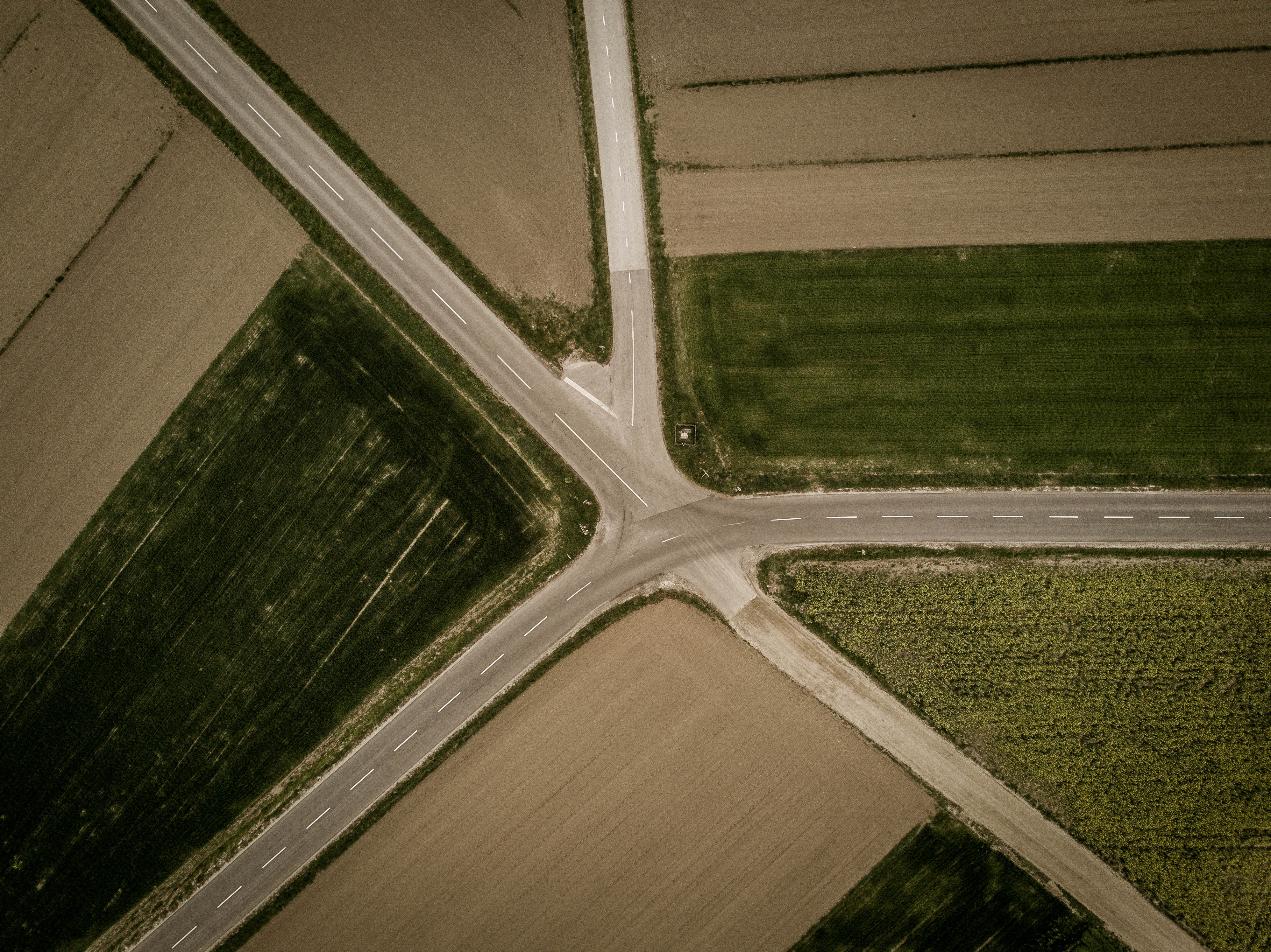 Crossroads